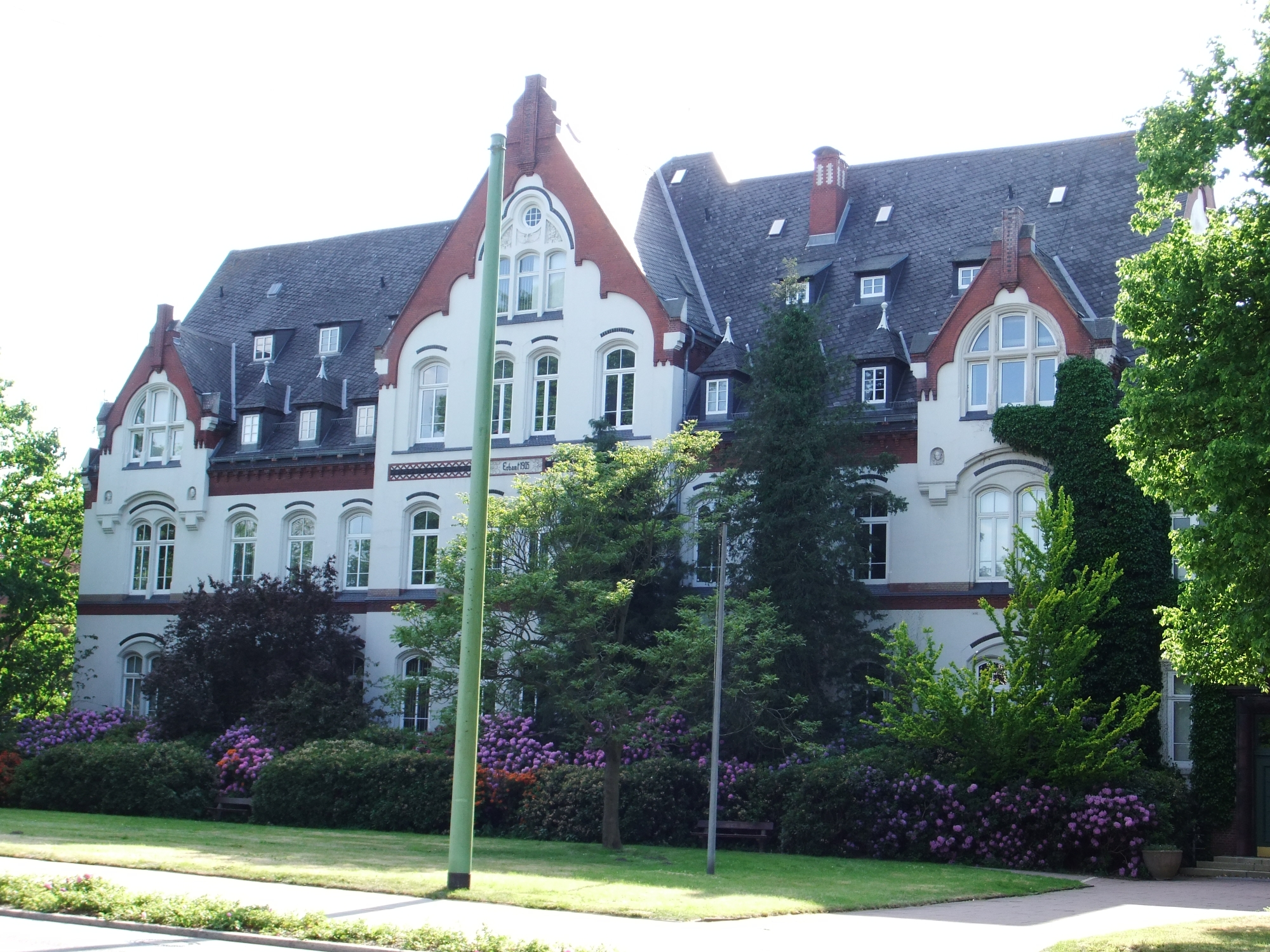 Krankenhaus Lehe, Gesundheitsamt in Bremerhaven, Wurster Straße 49, Haupthaus. Das abgebildete Objekt ist ein geschütztes Kulturdenkmal in der Freien Hansestadt Bremen, mit der Nr. 1986 beim Landesamt für Denkmalpflege registriert.